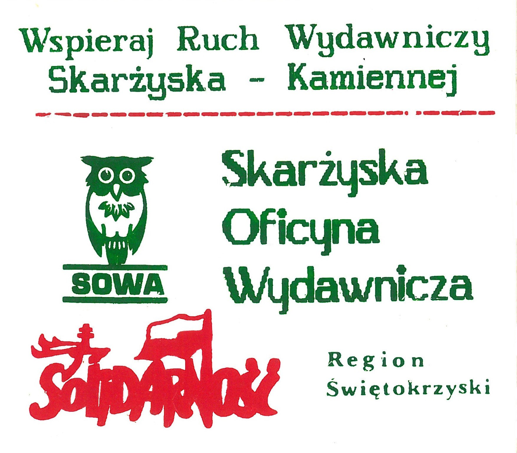 Sowa logo - nalepka promujaca wydawnictwo Skarzyska Oficyna Wydawnicza w latach 80.